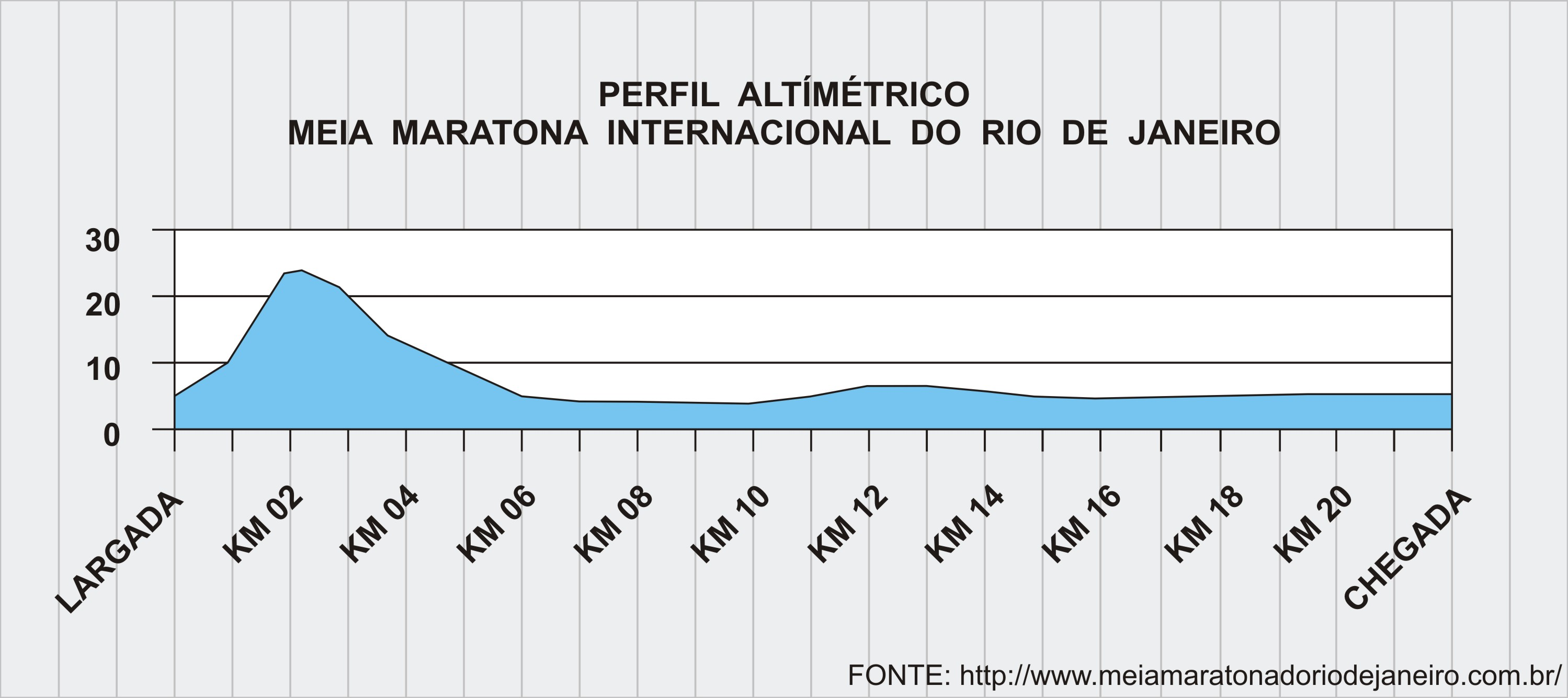 Reprodução do perfil altimétrico da Meia Maratona do Rio de Janeiro.